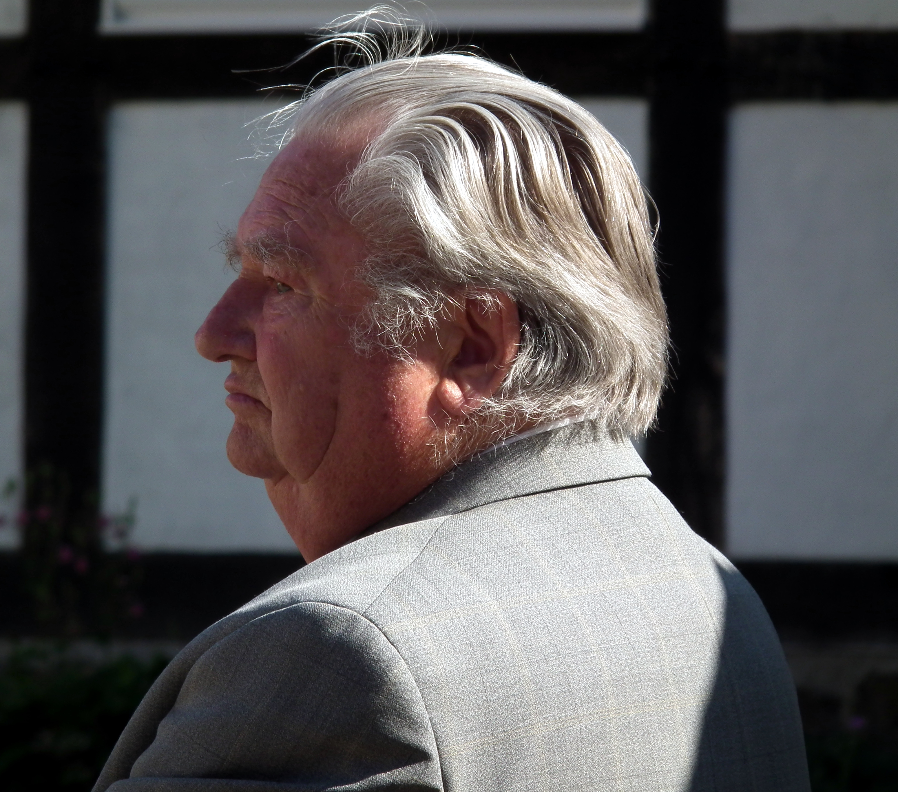 Harry Rieso, Ex-Bürgermeister von Hiddenhausen, auf dem Gelände von Haus Hiddenhausen. Anlässlich des Sommerkonzertes 2011, des Gesangvereins "Freundschaft" Hiddenhausen